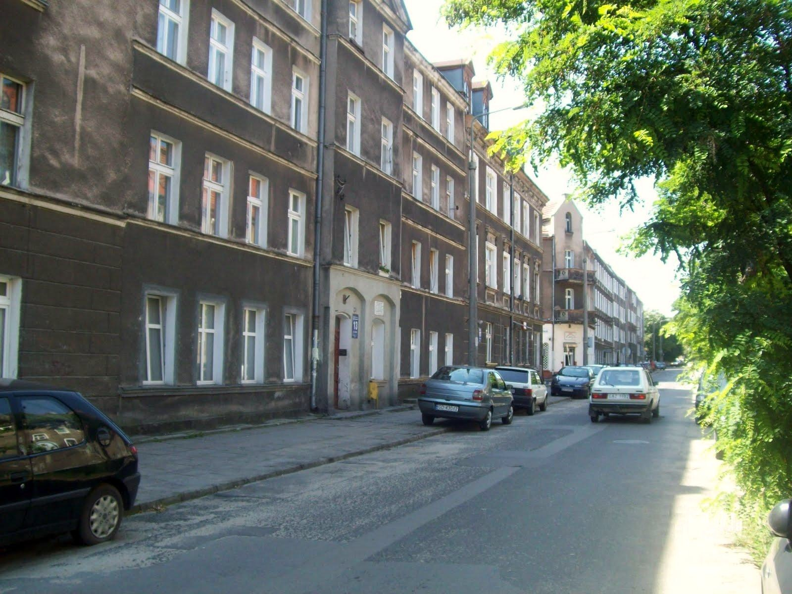 Gdańsk Wrzeszcz Dolny, ul. Lelewela.